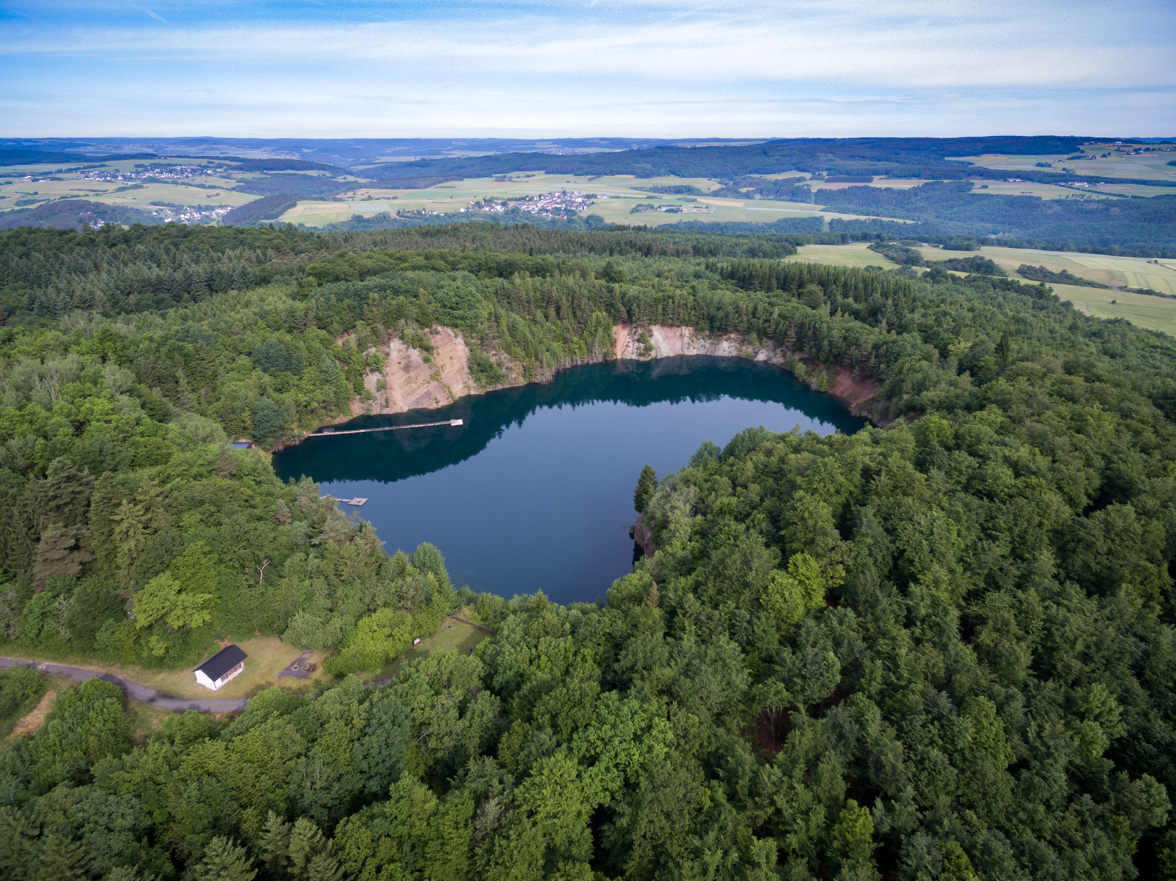 Hoffelder See, Aufnahme mit Kameracopter